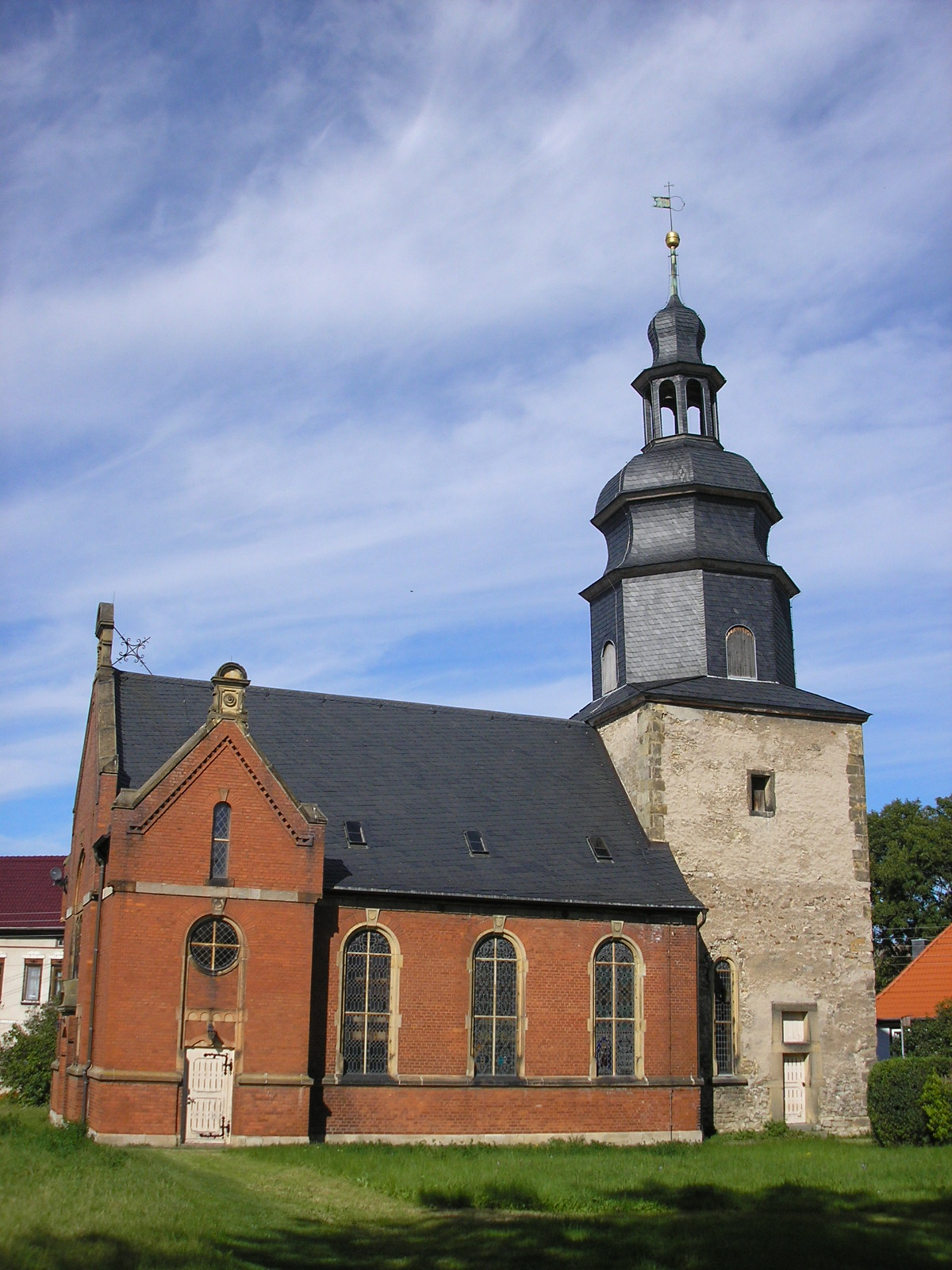 Die Kirche von Bösleben (Ilm-Kreis, Thüringen, Deutschland)